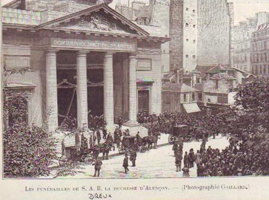 Funerais da Princesa Sofia Carlota da Baviera, Duquesa d'Alençon.